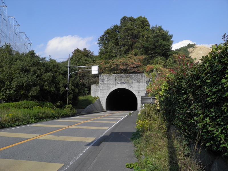 芦原トンネル（奈良県吉野郡大淀町）